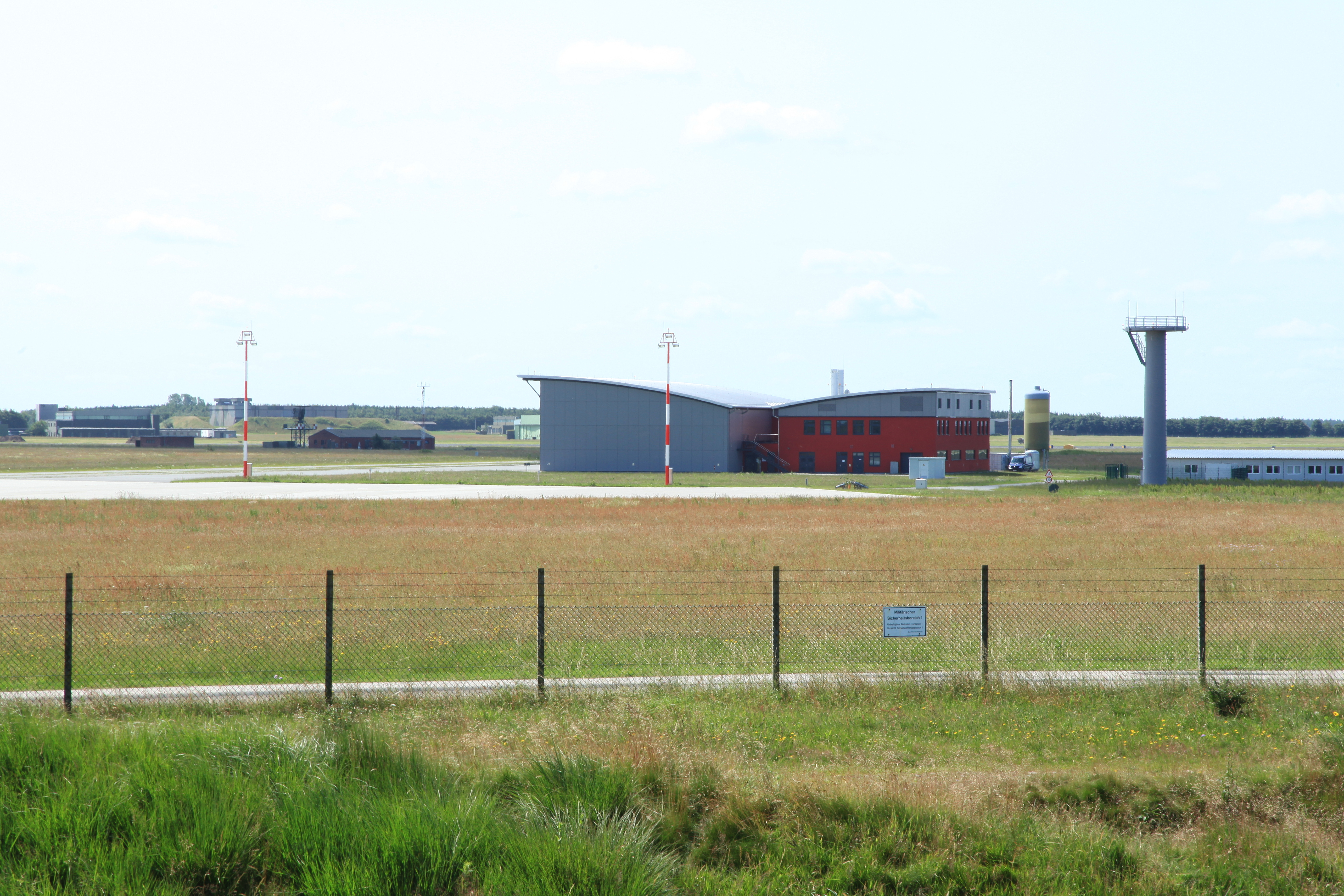 Kograben am Ochsenweg in Dannewerk, dahinter der Fliegerhorst Schleswig in Jagel